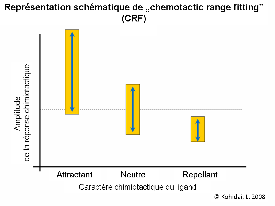 Représentation schématique de „chemotactic range fitting” (CRF)